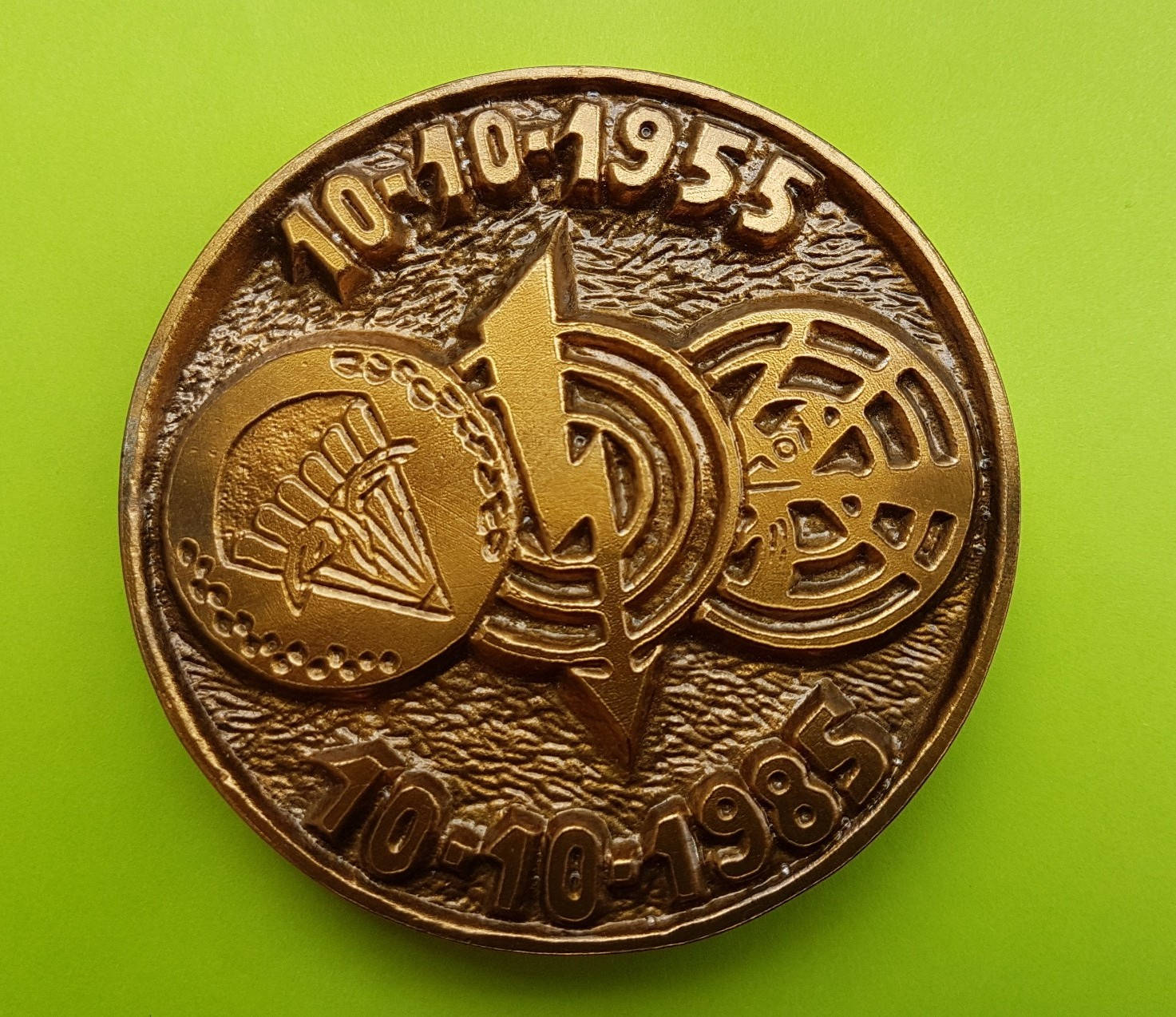 Awers. Medal Pamiątkowy JW 1200 (8br)